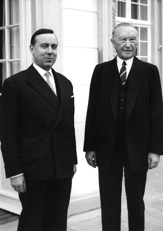 Besuch des französischen Premierministers Debré in Bonn am 7.10.1960 Im Bild: Der französische Premierminister und Bundeskanzler Konrad Adenauer auf der Terrasse des Bundeskanzleramtes